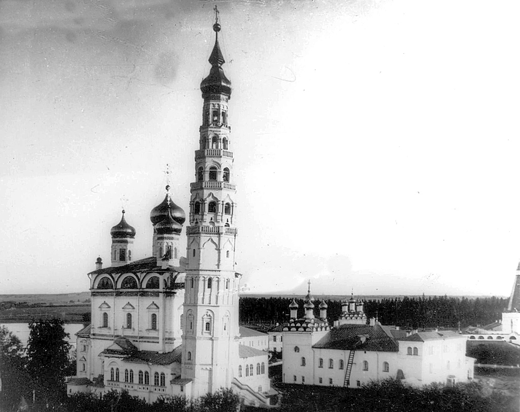 Иосифо-Волоцкий монастырь